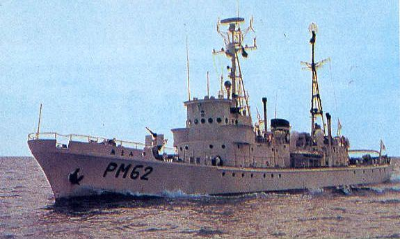 まつうら型巡視船「あまみ」。